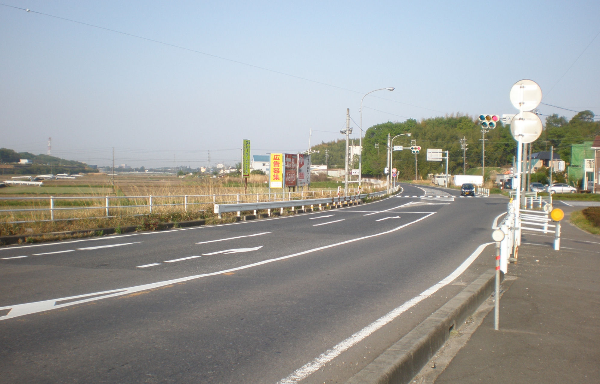 愛知県道199号高蔵寺小牧線（撮影場所は愛知県小牧市大草）